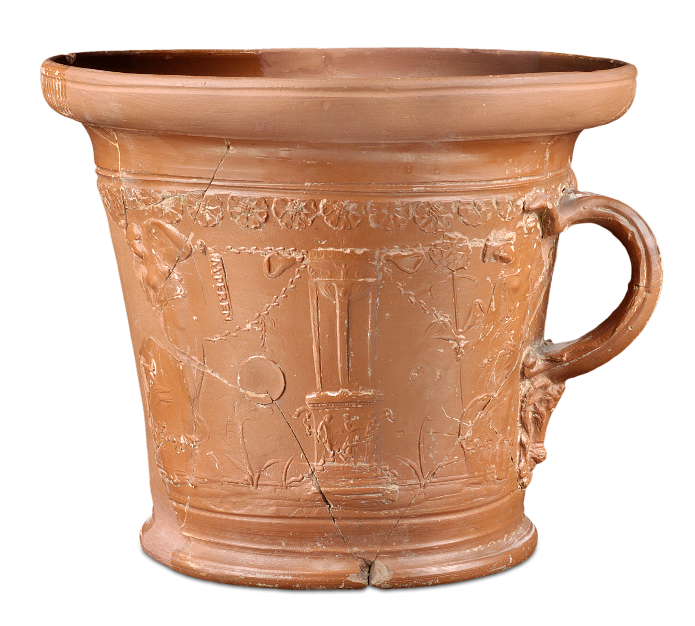 Vas de Terra Sigillata Itàlica decorada amb escena diononisíaca amb mènades, vestides amb un vel transparent, ballant al voltant d'un trípode. MNAT 2719